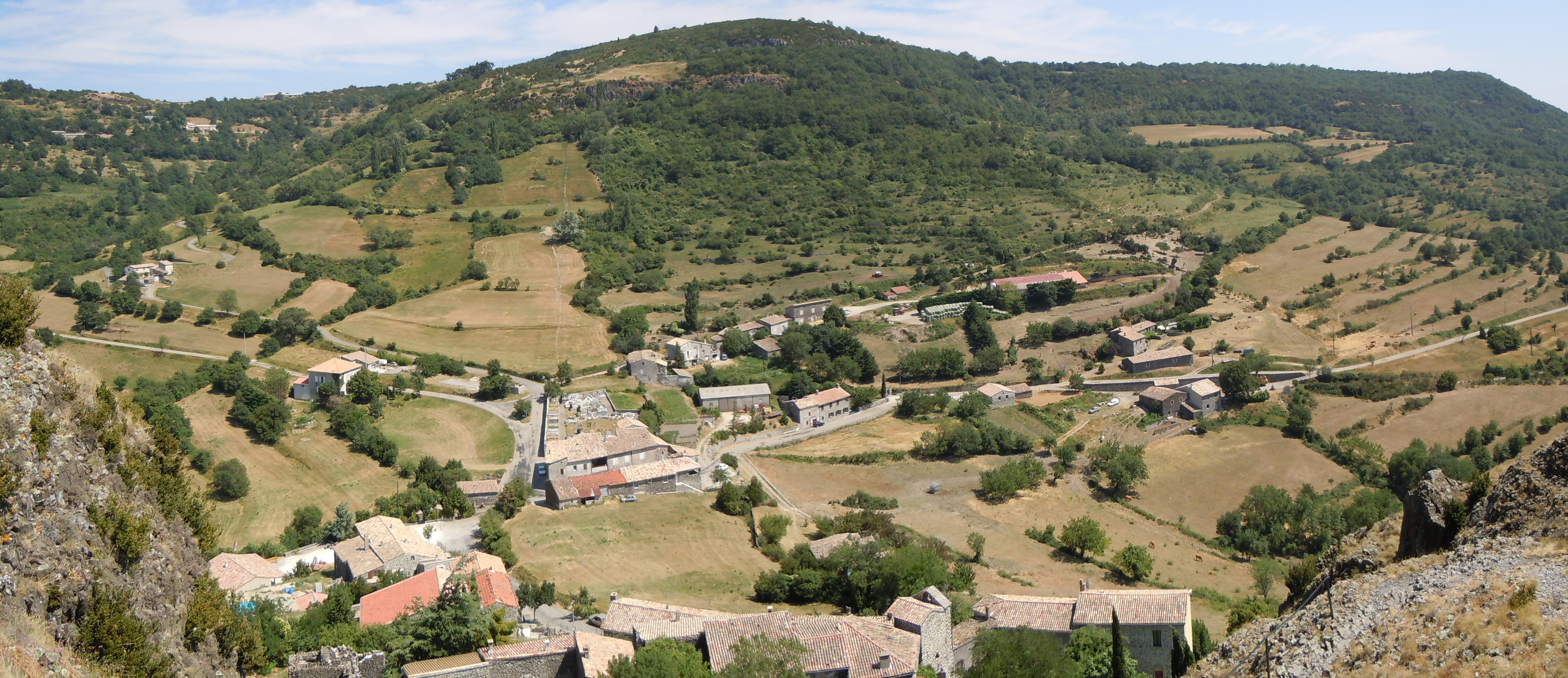 Sceautres : Panorama depuis le sommet du Neck - Ardèche - France